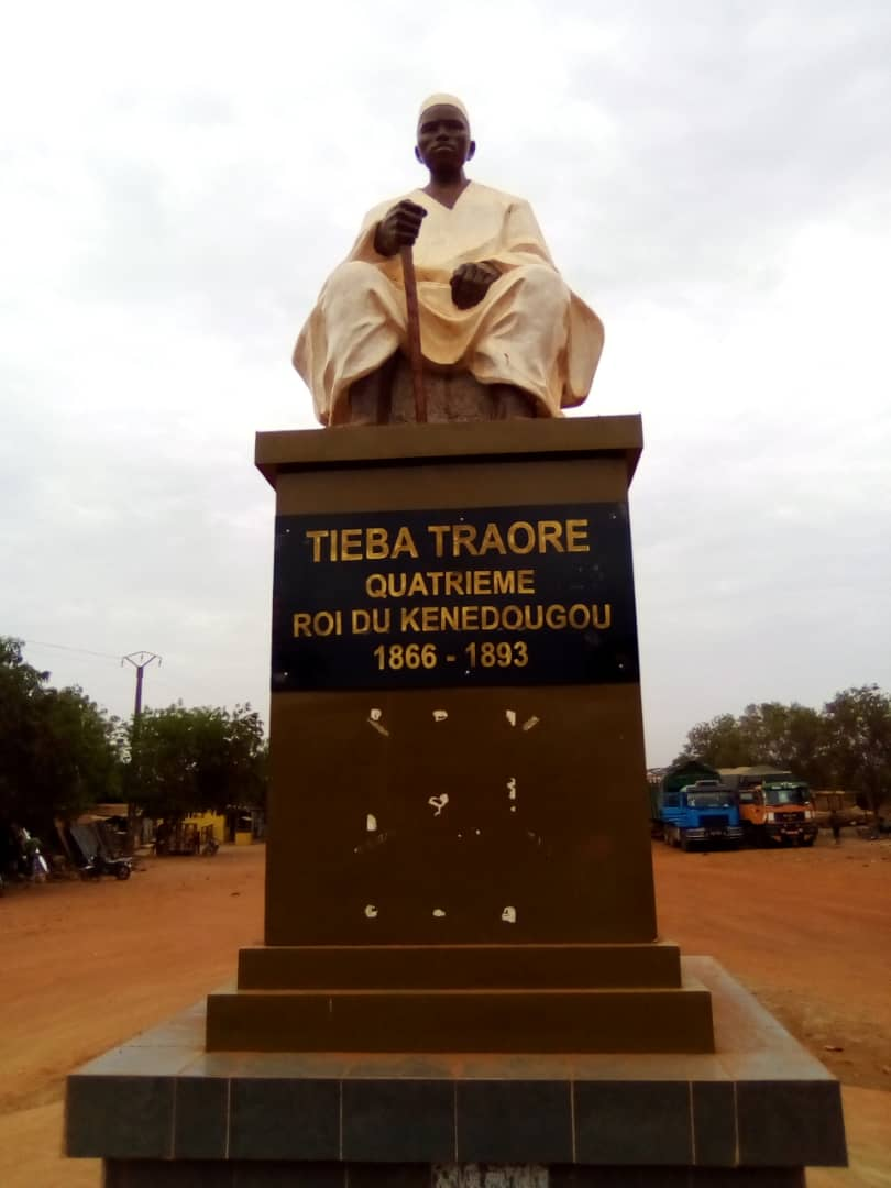 concours wikichallenge écoles d'Afrique 2019